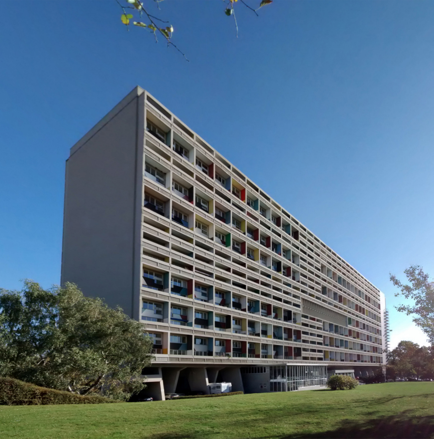 Corbusierhaus Berlin, Unité d’Habitation, type Berlin, Le Corbusier (Charles-Édouard Jeanneret) & André Wogenscky, Flatowallee, Berlin-Westend, 1956–1958